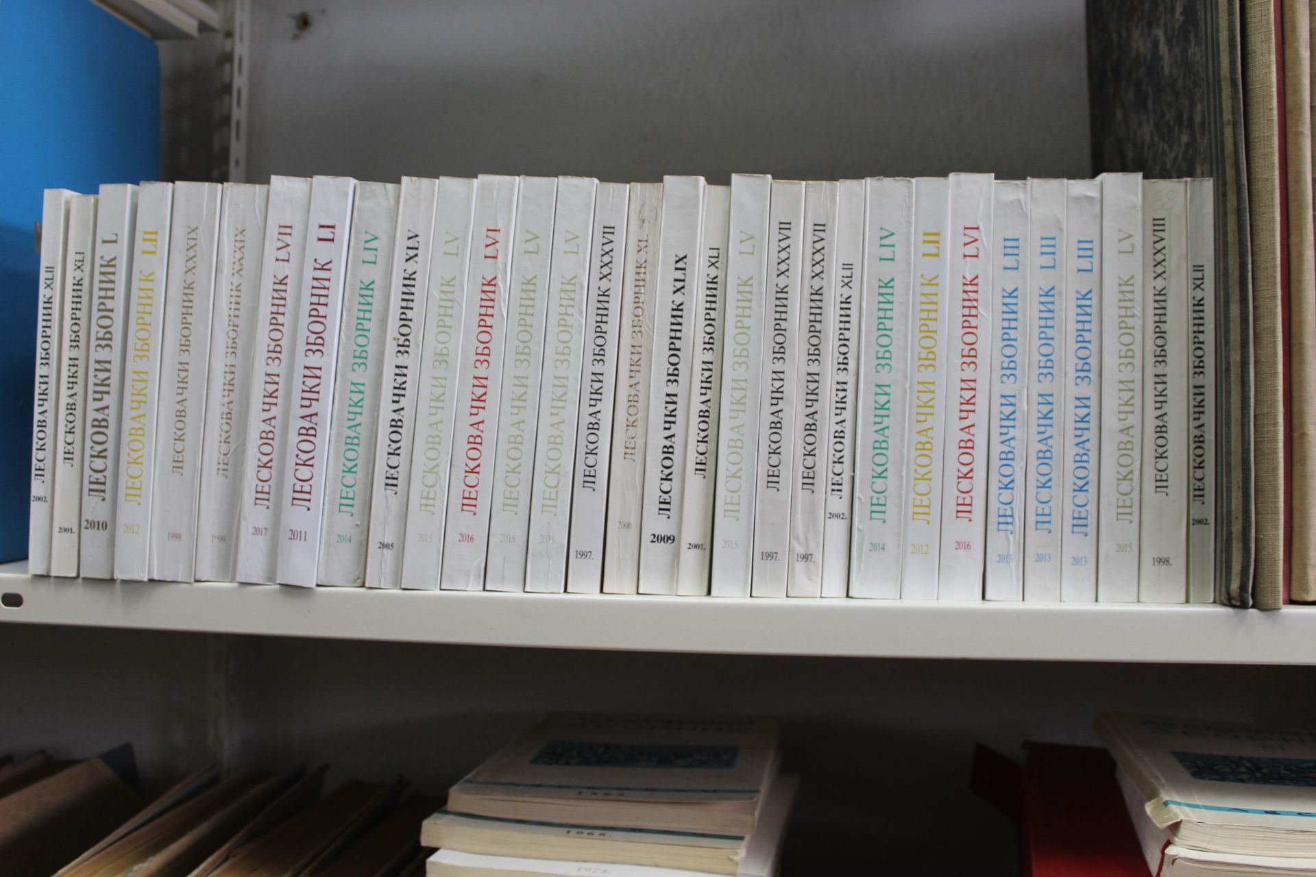 Srpski (latinica): Leskovački zbornici.